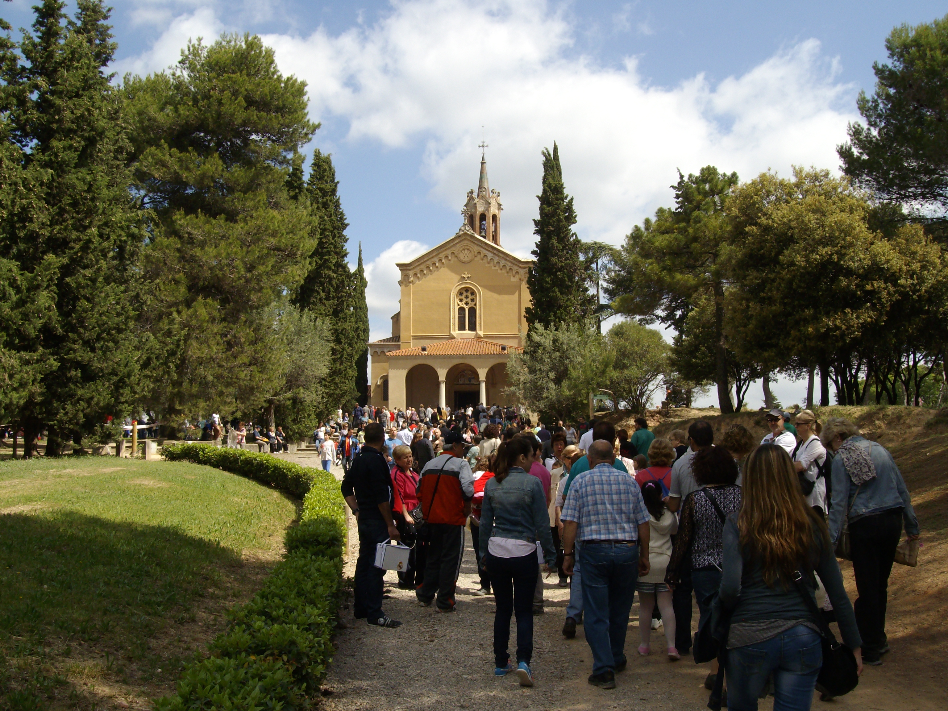 Aplec de la Salut 2013, Sabadell.